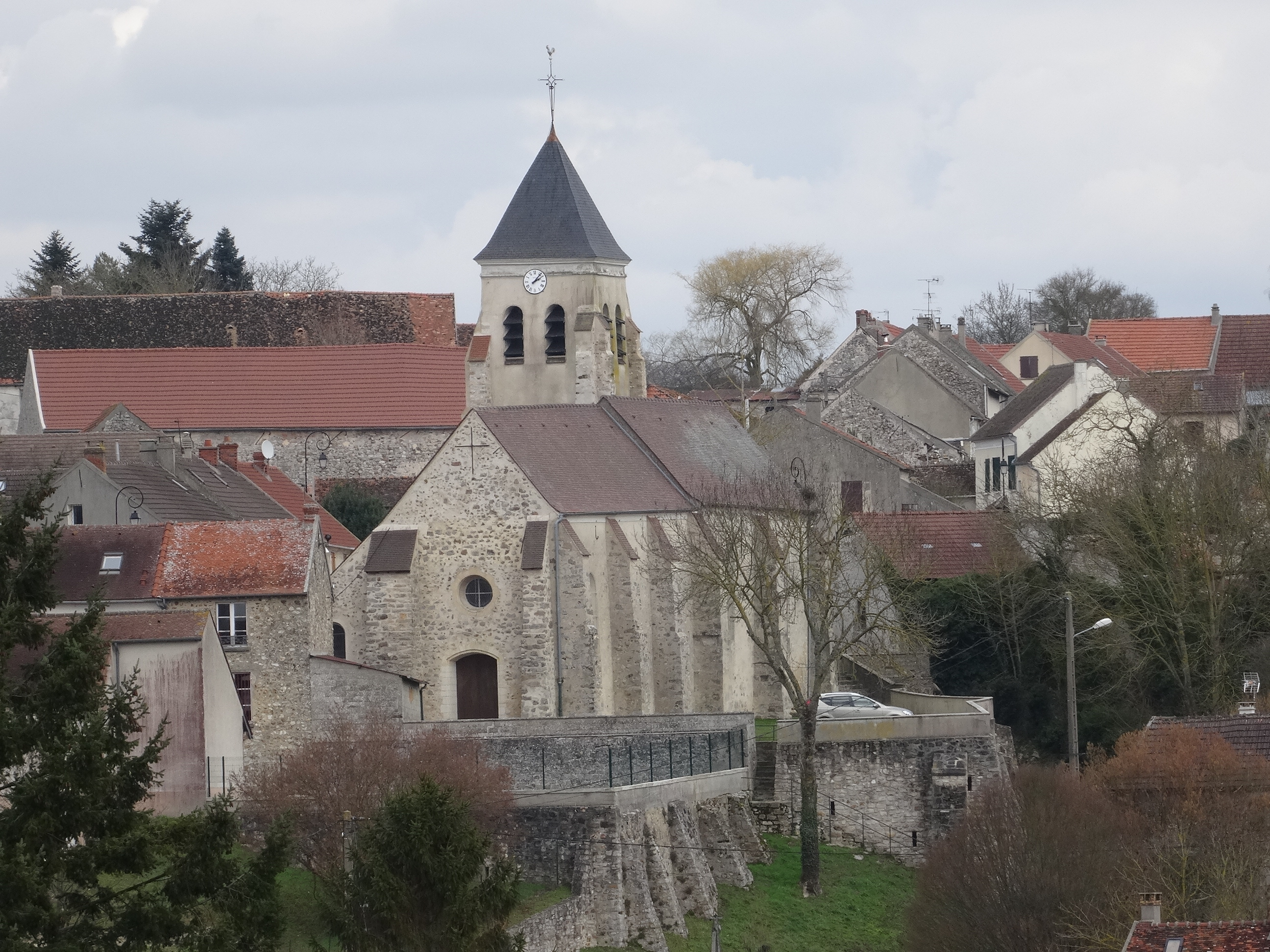 Église Notre-Dame de Germigny-sous-Coulombs. (Seine-et-Marne, région Île-de-France).